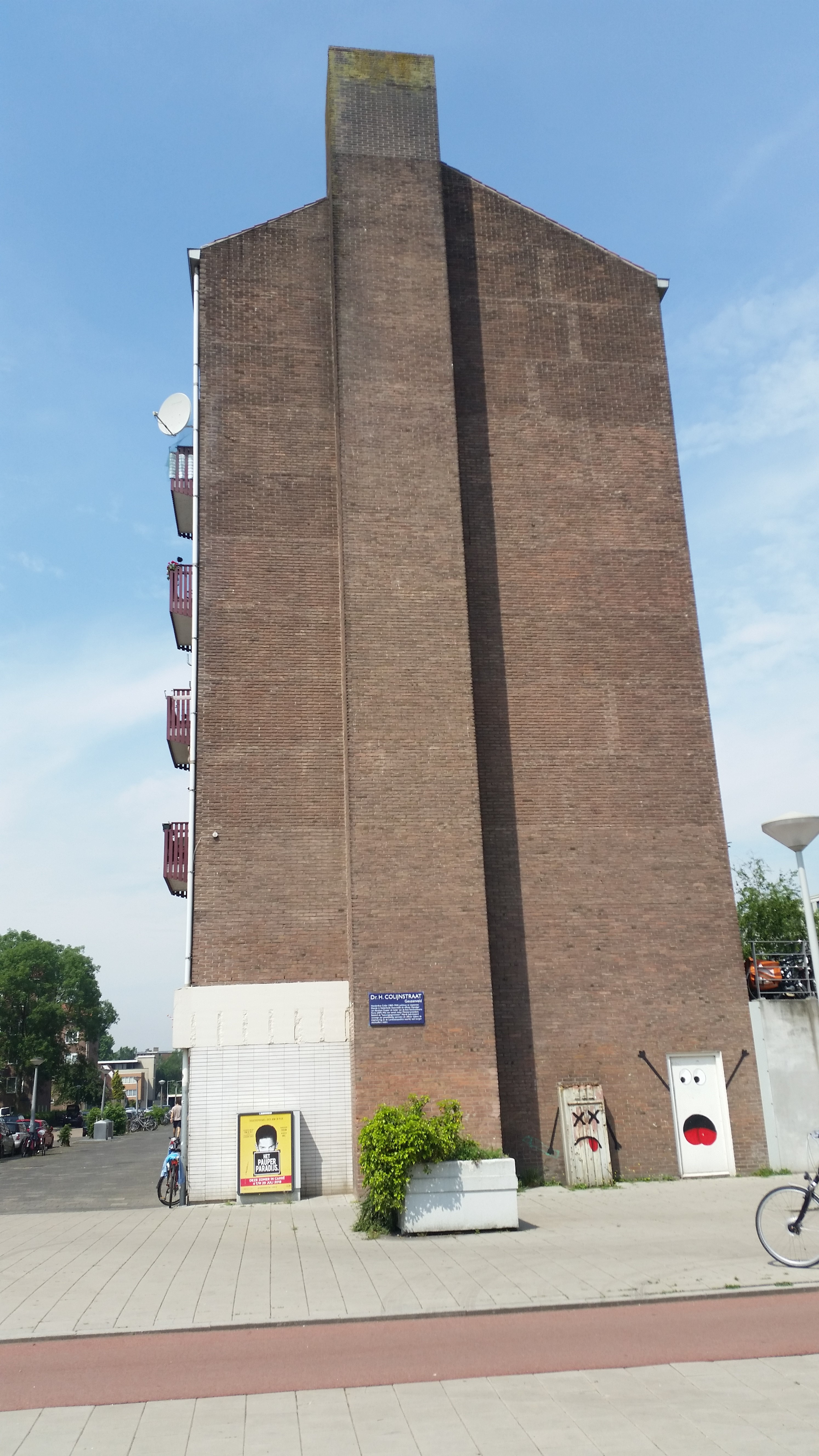 De flat waarop in 2019 Memories werd geplaatst door Bastardilla in 2018